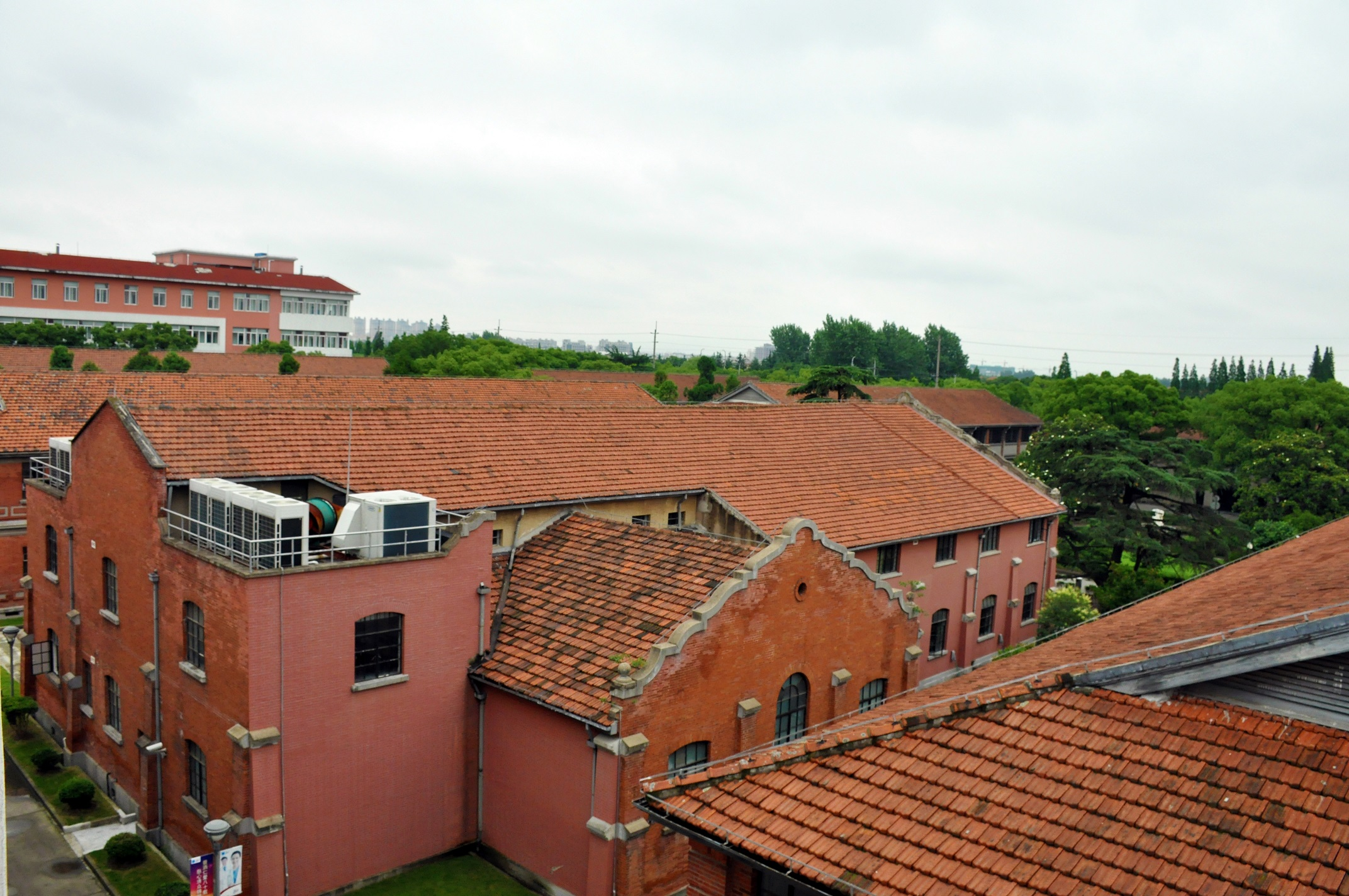 上海普慈疗养院旧址 沪闵路3210号 1935年